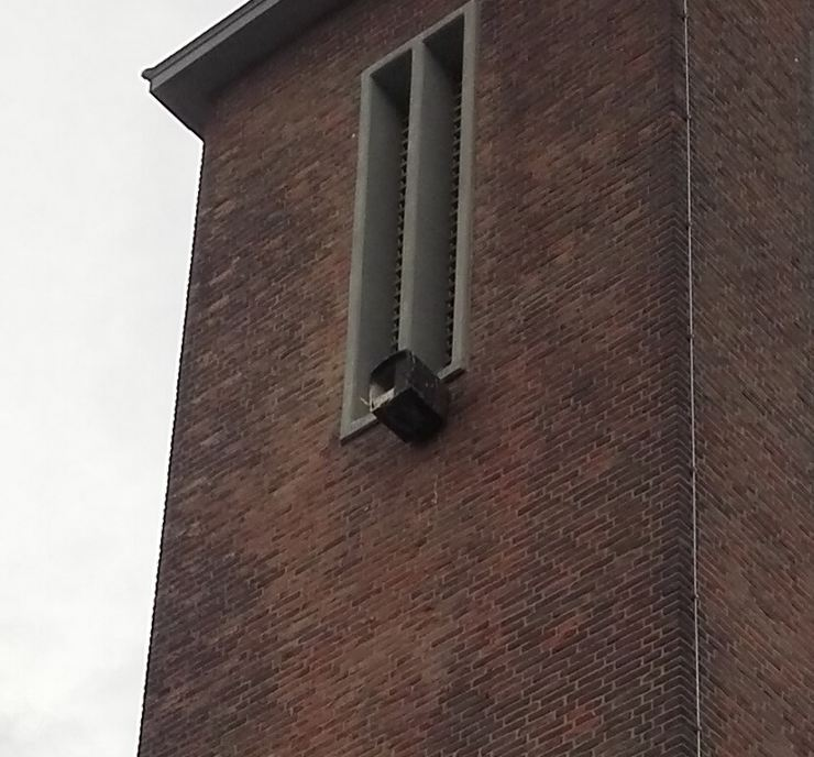 Nistkasten am Turm der Rotter Kirche